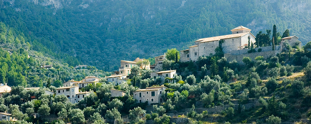 Deia